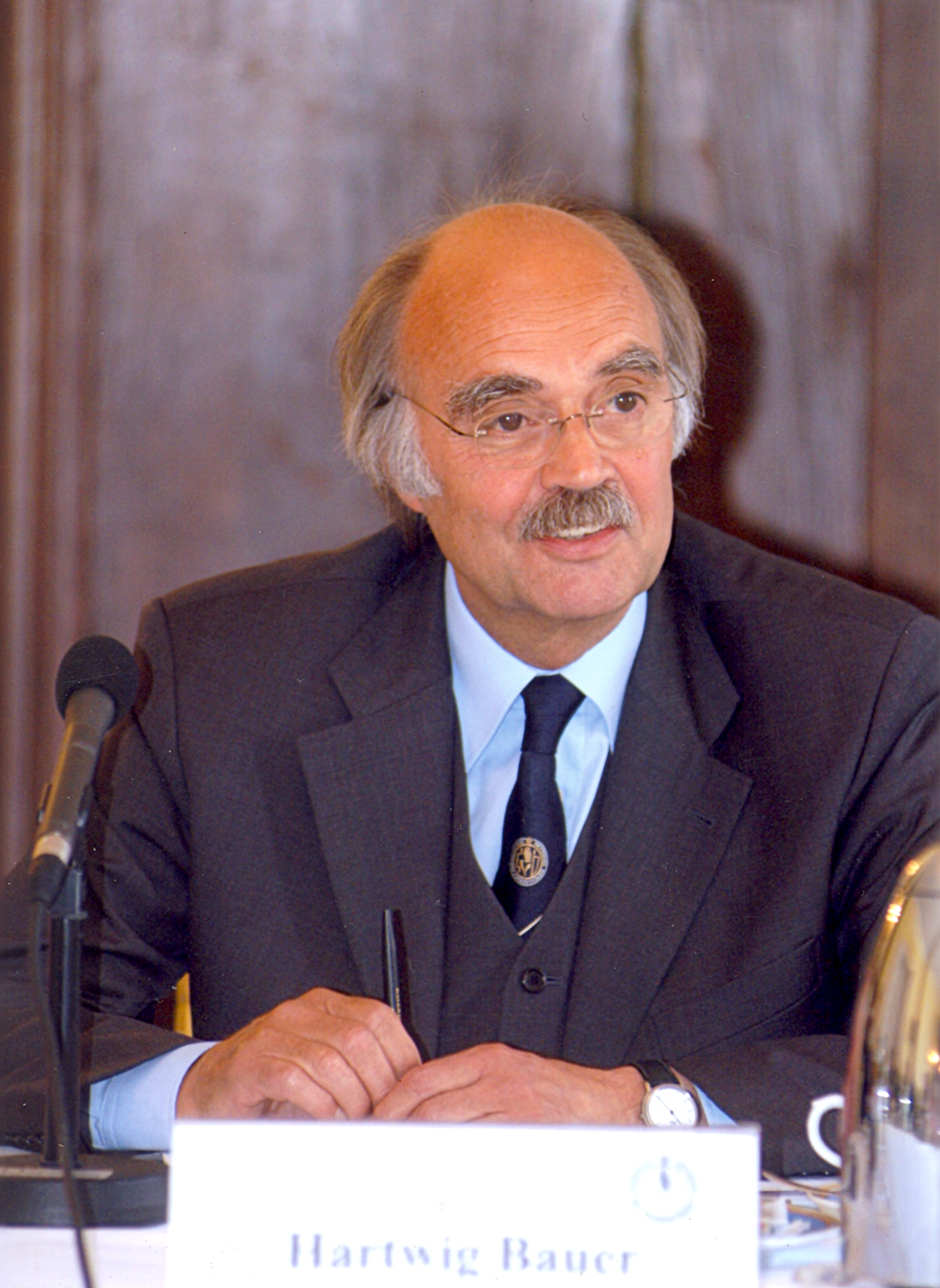 Prof. Dr. Hartwig Bauer auf einer Pressekonferenz anlässlich des Deutschen Chirurgenkongresses 2005